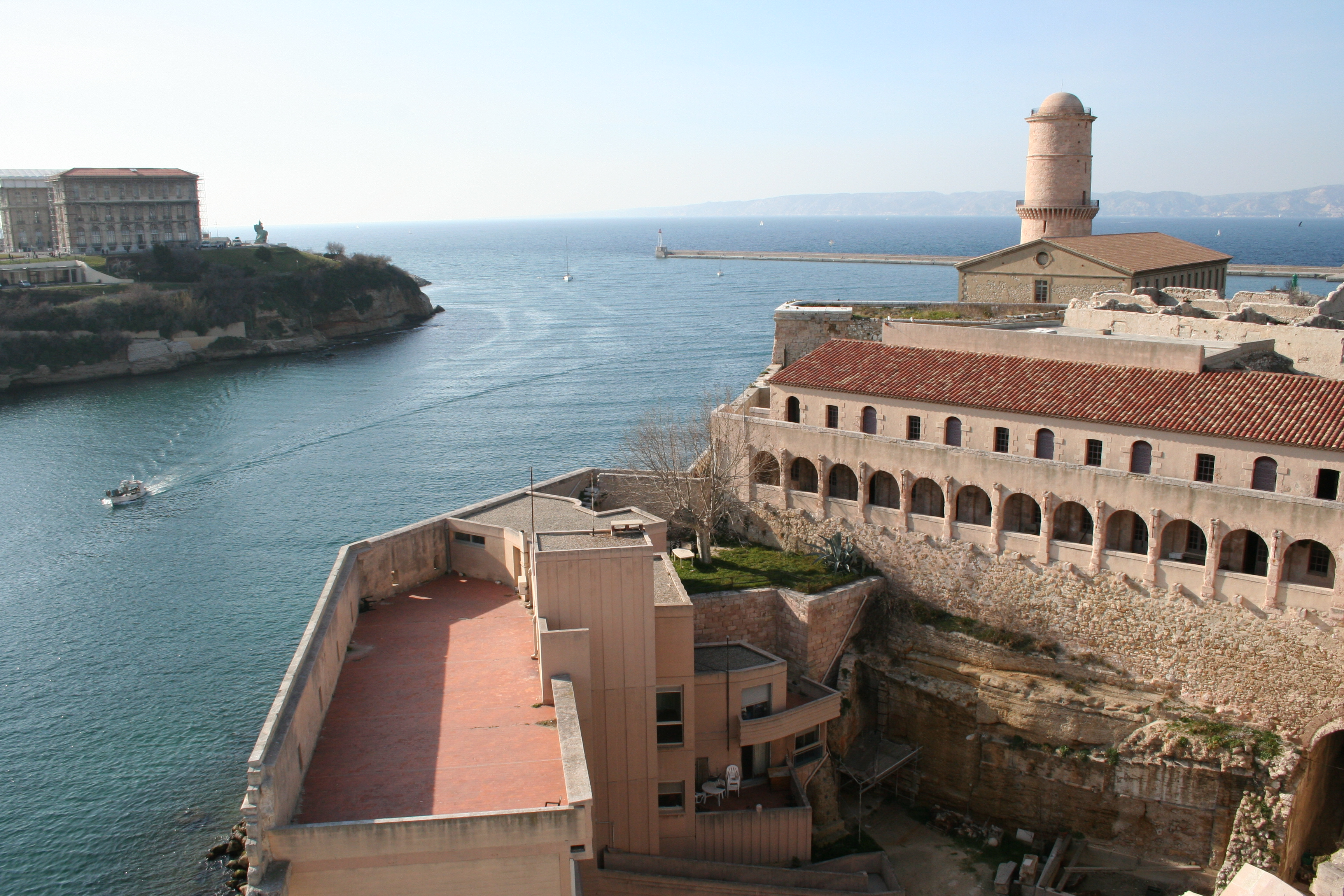 Vue du Fort Saint-Jean à Marseille prise depuis la terrasse de la tour du roi René. A gauche ancien bâtiment du département de recherches archéologiques subaquatiques et sous marines et à droite galerie des officiers. Au fond ancienne caserne devenue bâtiment Georges Henri Rivgière et tour du fanal.